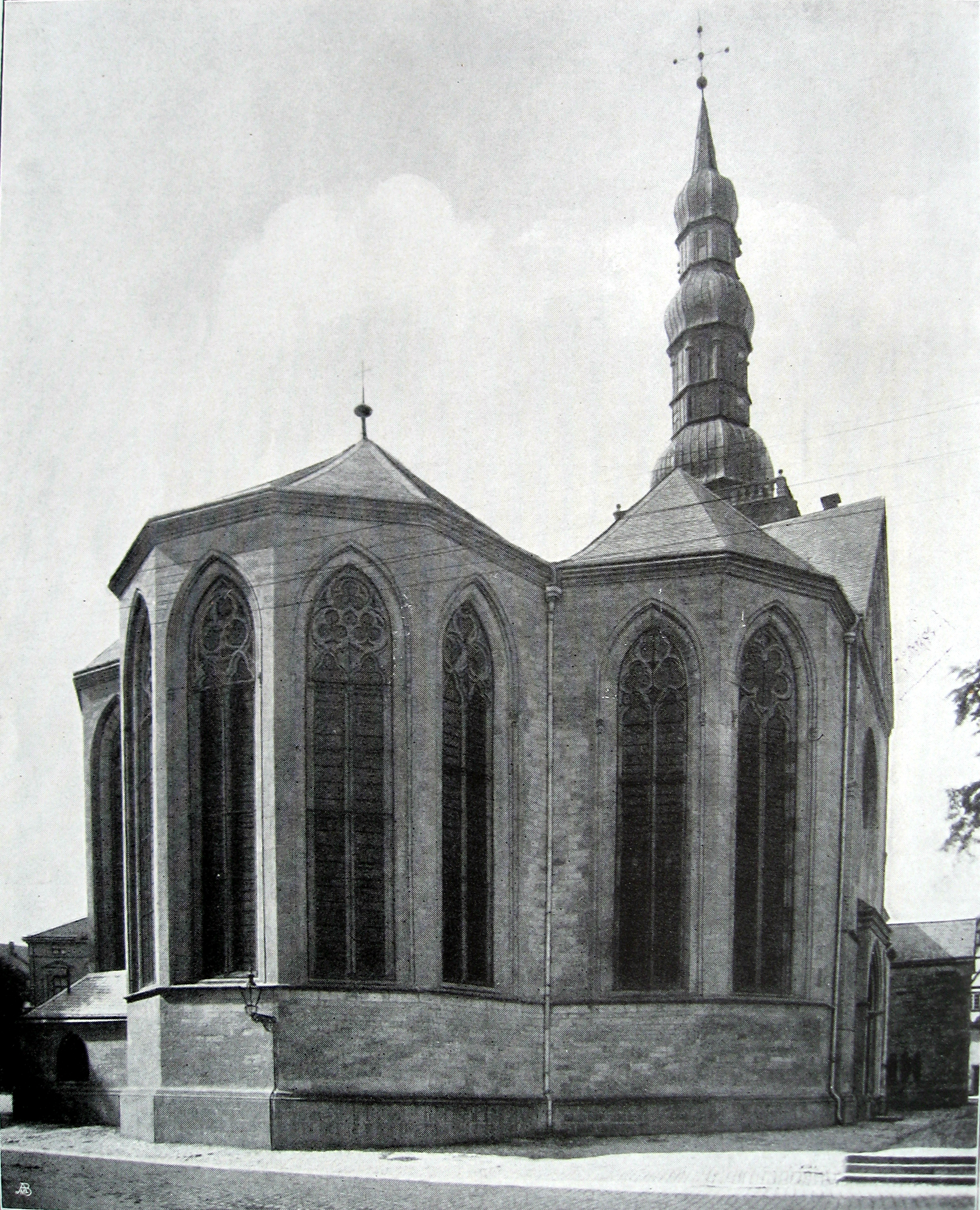 Soest, Petrikirche, Ostansicht, Ludorff 1905